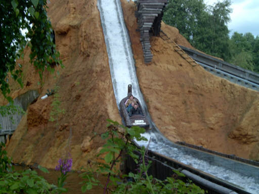 Vandrutchebanen "Træstammerne" i Djurs Sommerland.